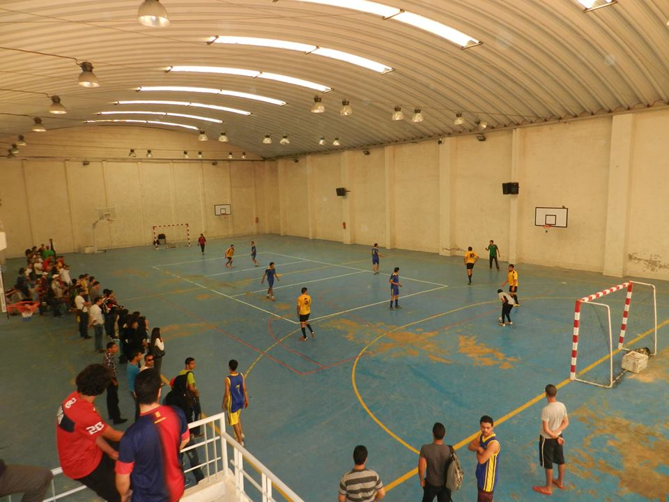 Salle omnisport